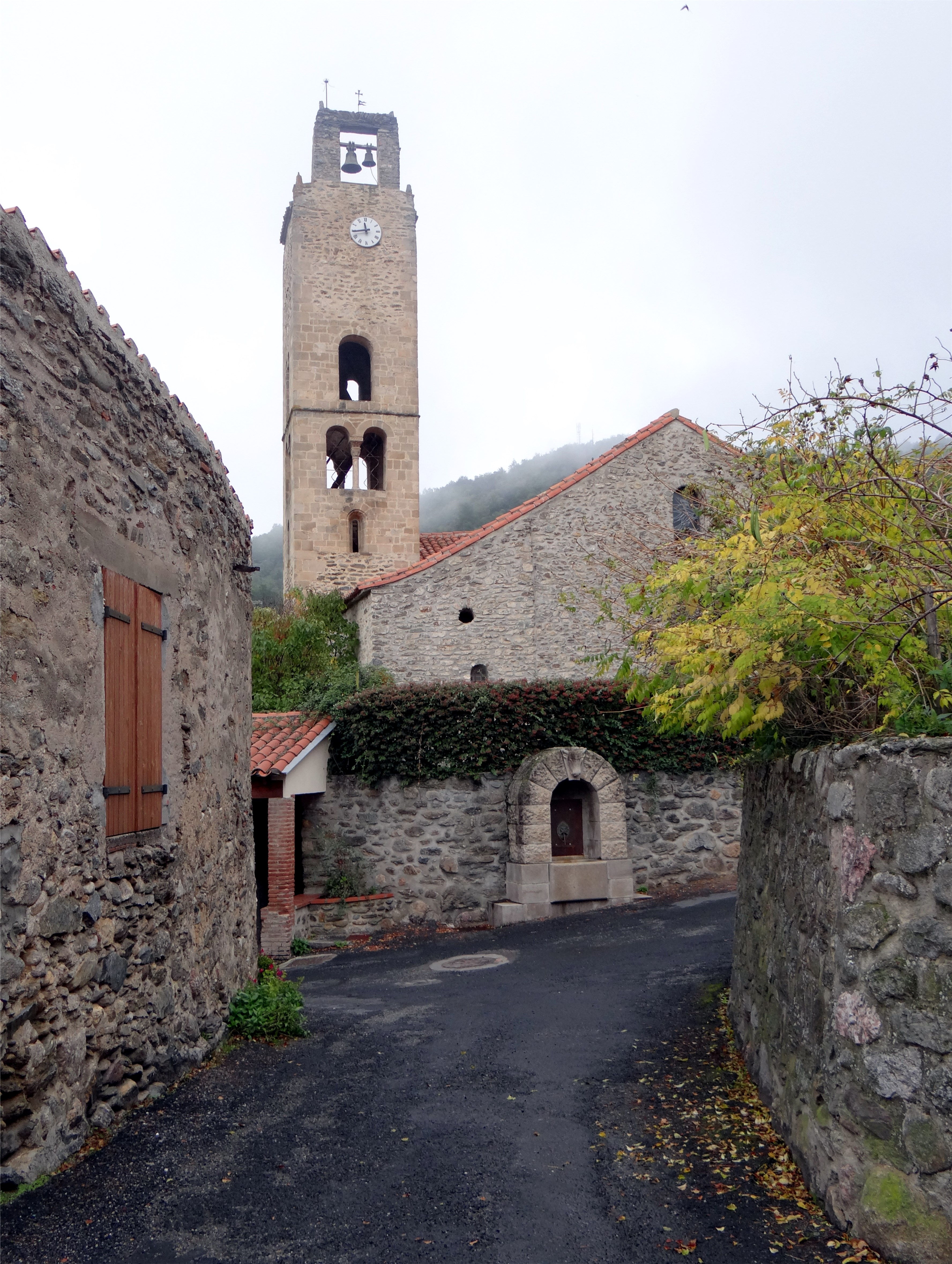 Église Saint-Fructueux de Taurinya, Pyrénées-Orientales, France